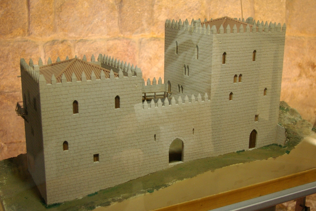 "Casa do Infante" museum in Porto, Portugal